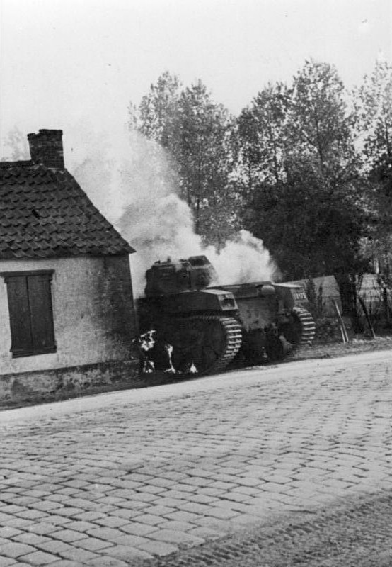 Heeresfilmstelle Negativ-Nr.: P.K. 88/5 Aufnahme am: 19.05.40 Ort: Zwyndrecht bei Antwerpen Land: Belgien in Brand geschossener belgischer Panzerkampfwagen